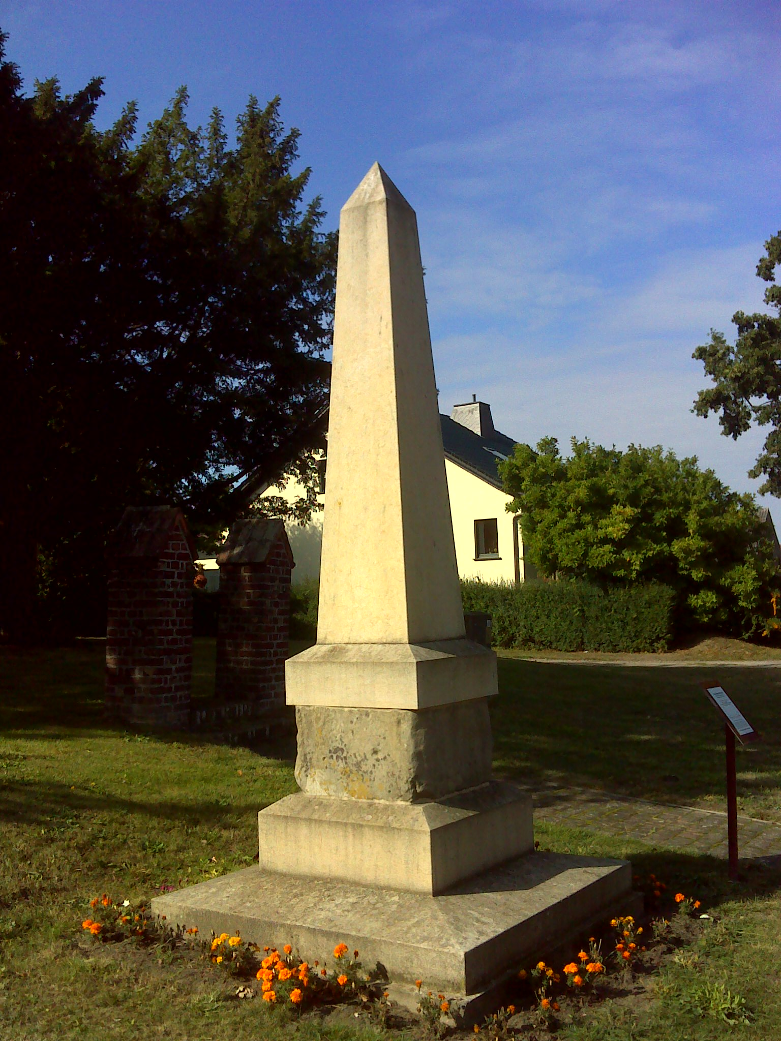 Preußischer Ganzmeilenstein in Linum bei der Dorfkirche